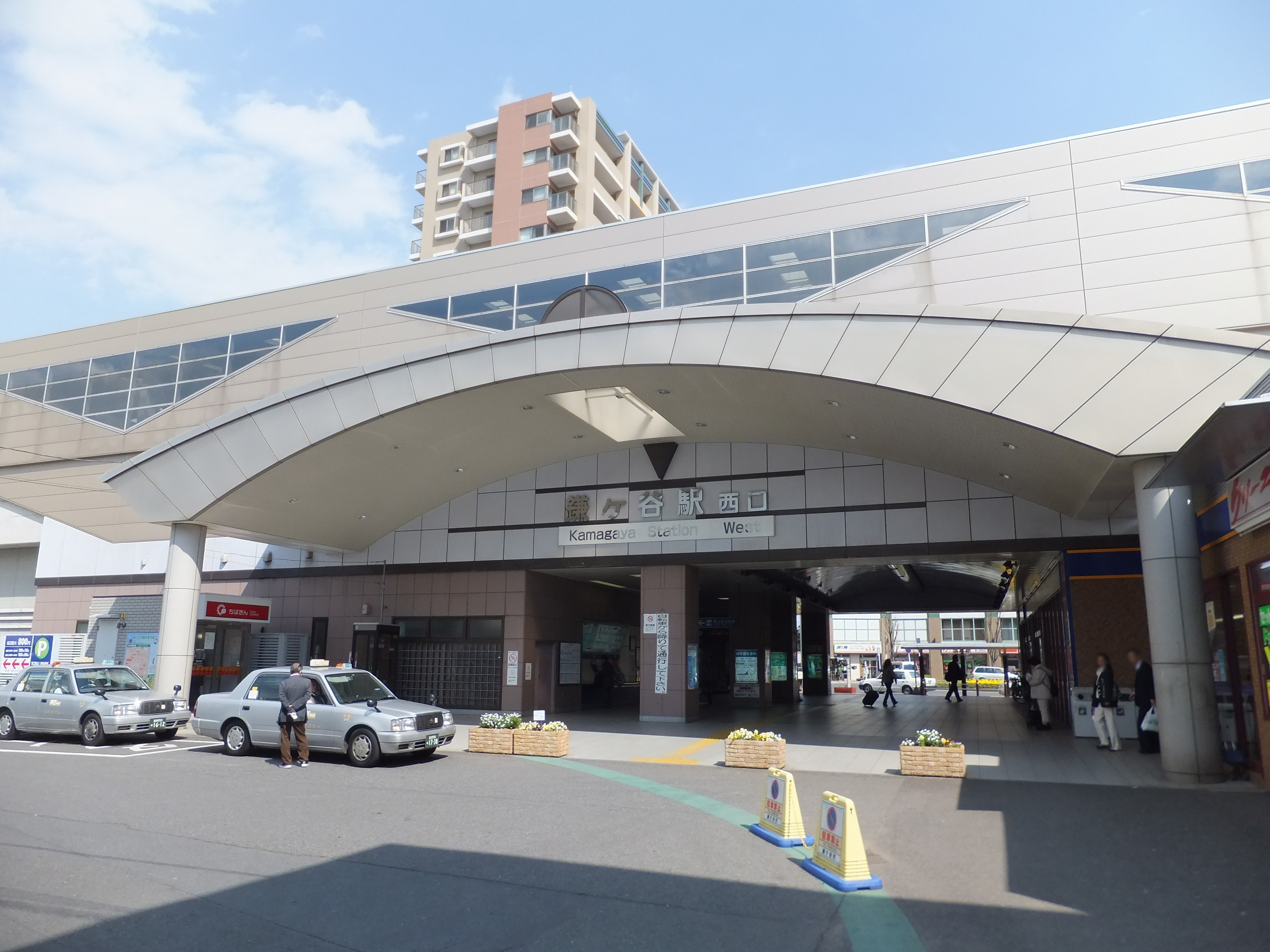 東武野田線鎌ヶ谷駅西口